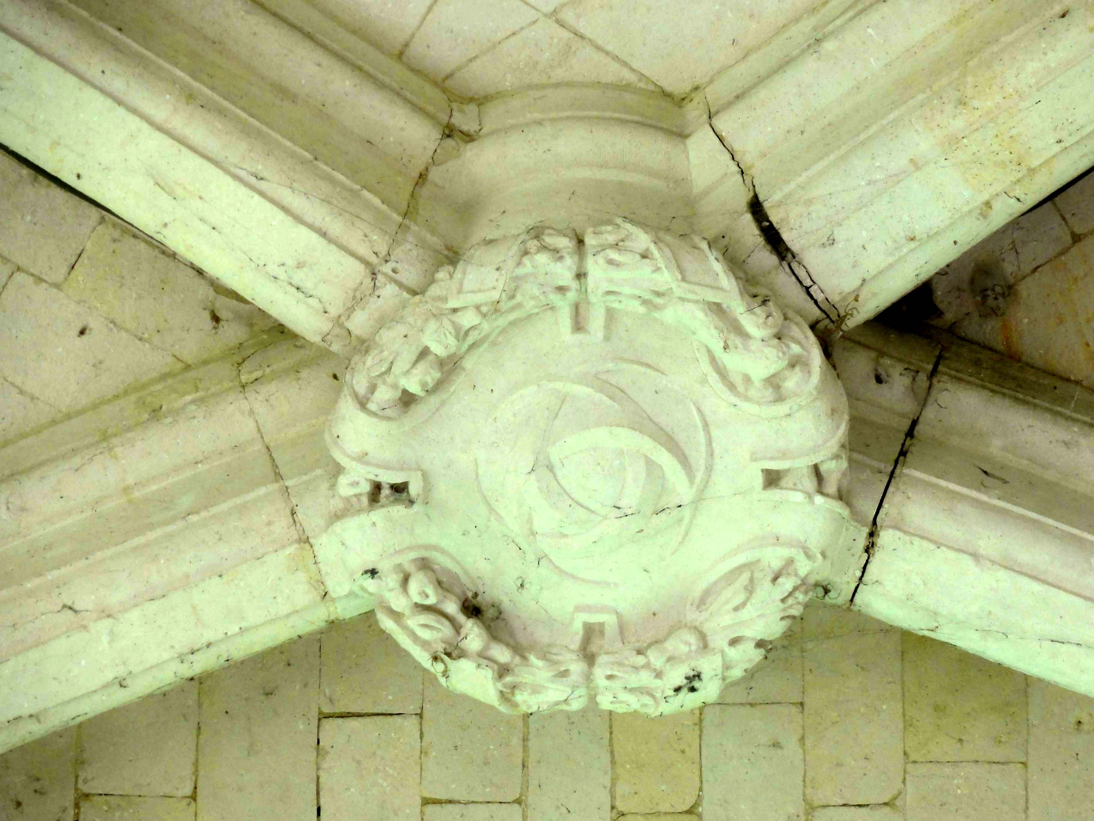 Clé de voûte (voir titre).